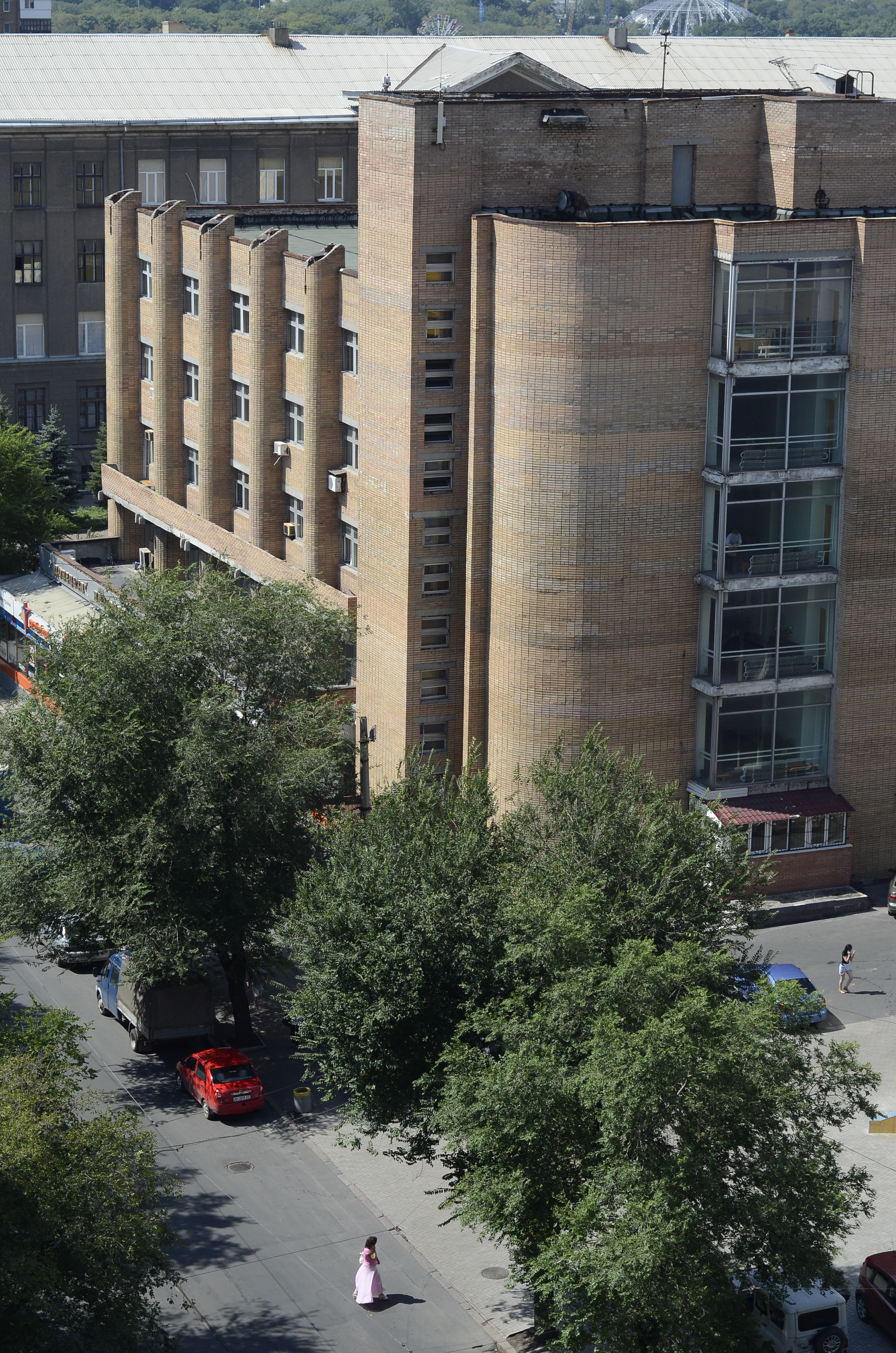 Вид Донецка из торгово-развлекательного комплекса Green Plaza